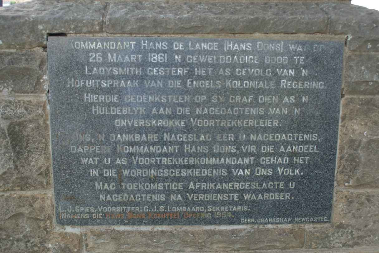 Gedenksteen